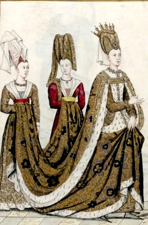 Isabeau de Bavière with her ladies; goauche on parchment